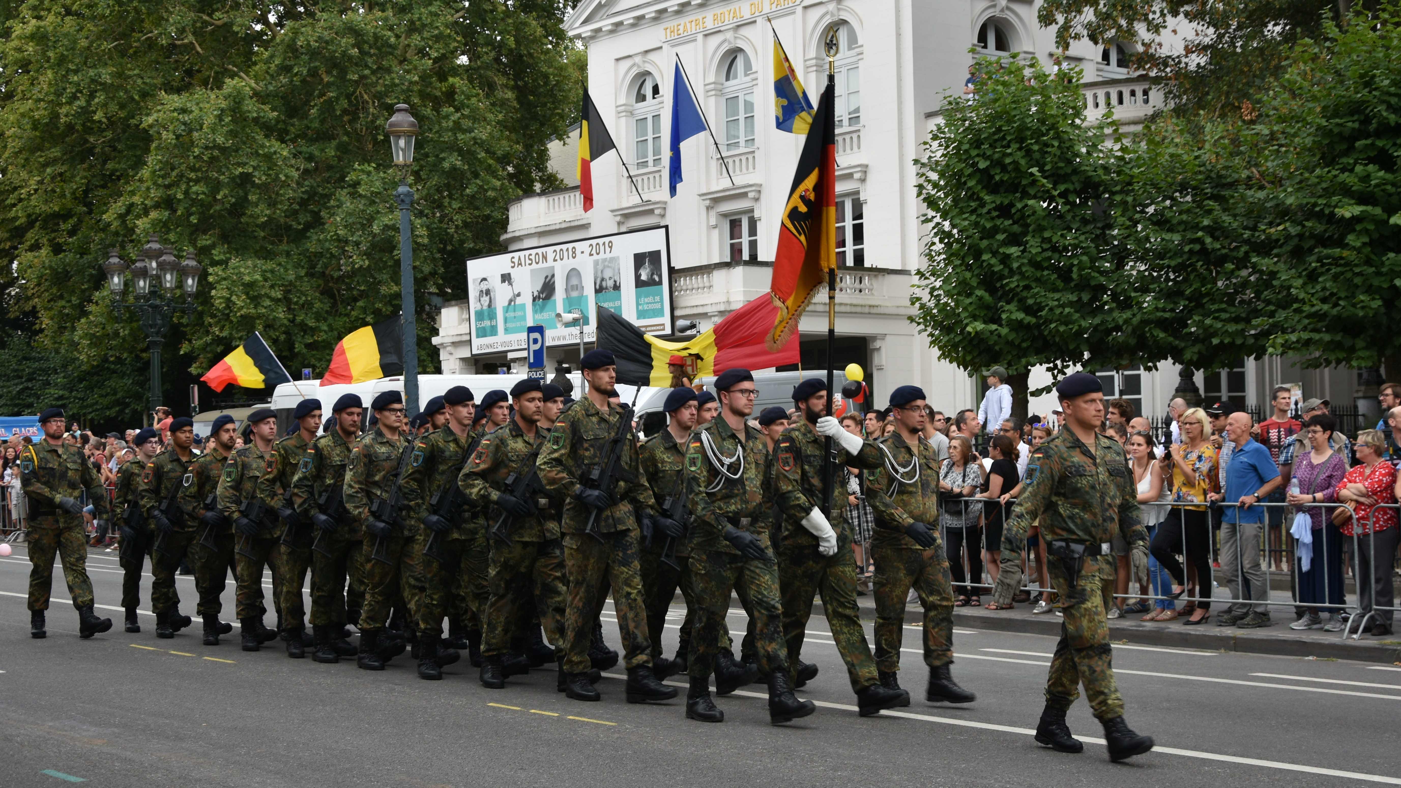 Nationaal defilé 2018 21-07-2018 16-30-58 This photo of immaterial heritage has been taken in the Brussels Capital Region